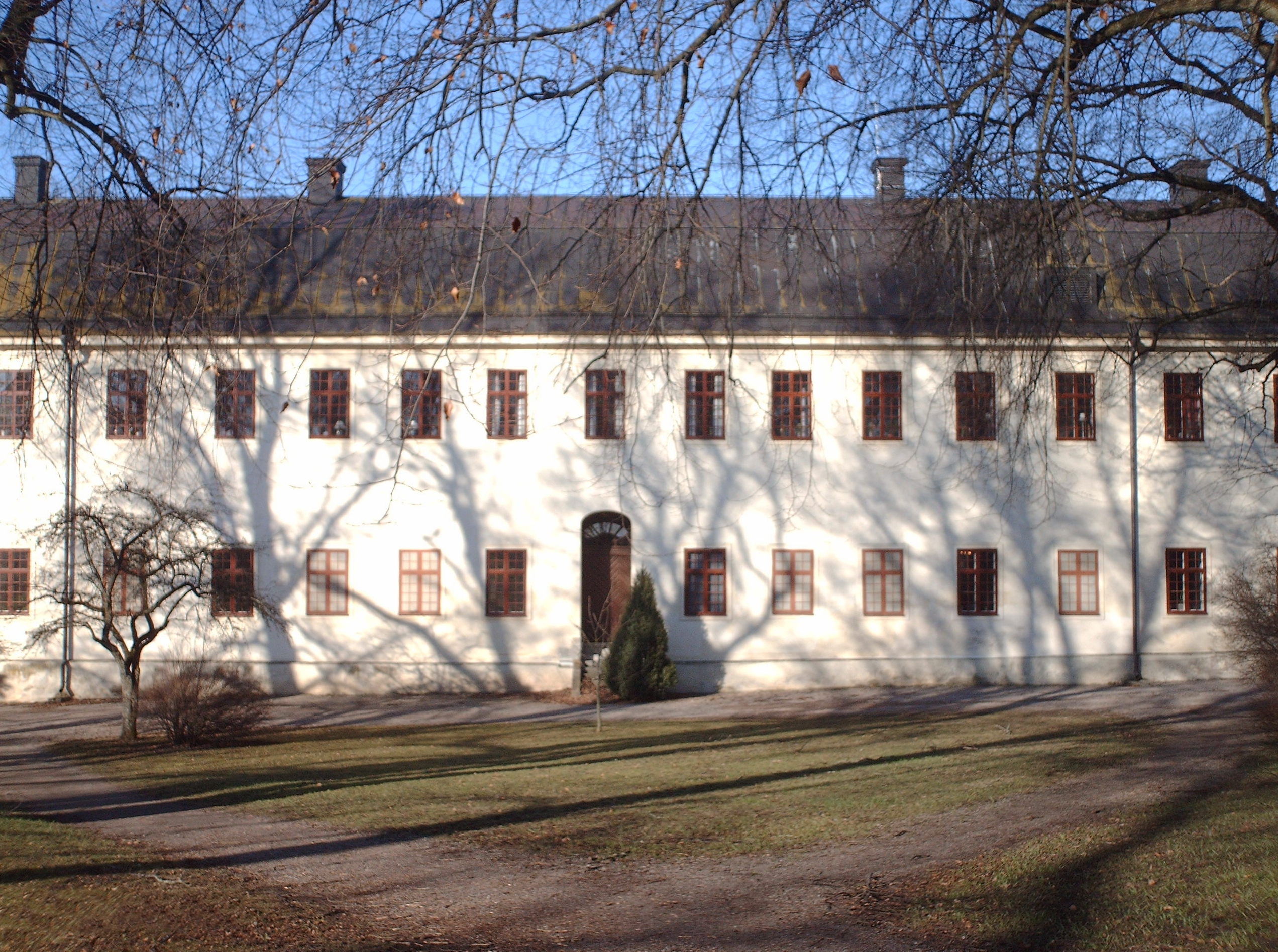 The convent in Vadstena, Sweden.